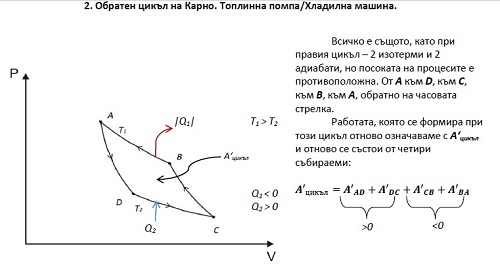 Обратен цикъл на Карно